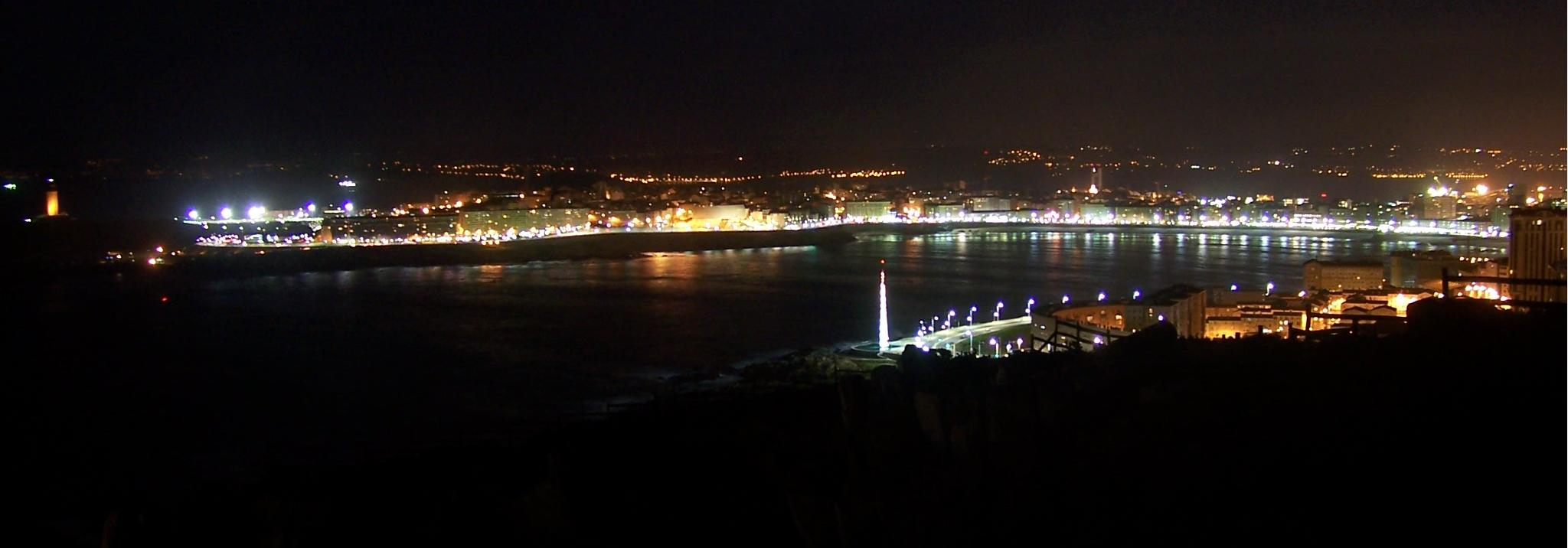 Foto nocturna de la bahía del Orzán desde el monte de San Pedro (Coruña)